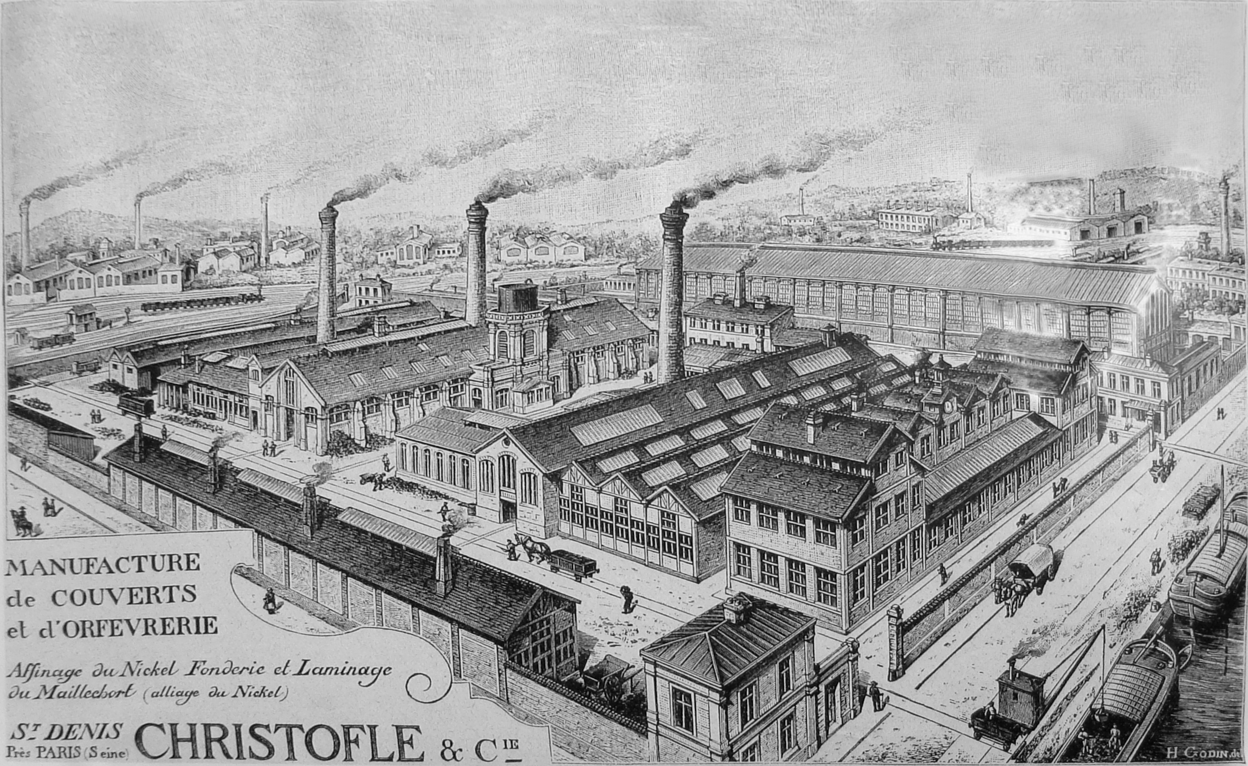 Reproduction d'une vue de l'usine Christofle de Saint-Denis